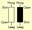 Gemaakt met Wall Street Professional